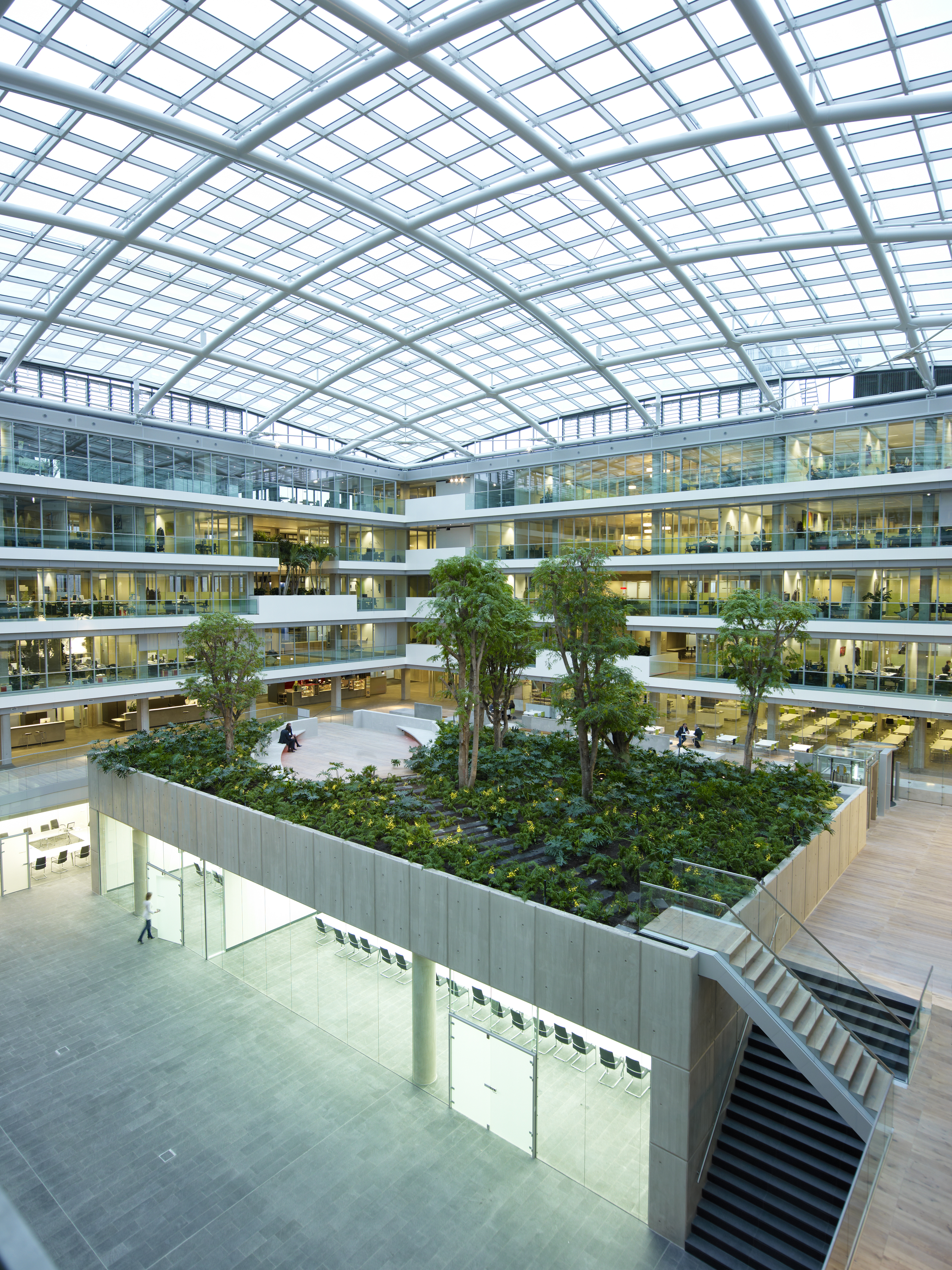 Ministerie van Financiën, Den Haag, binnenruimte na renovatie in 2009